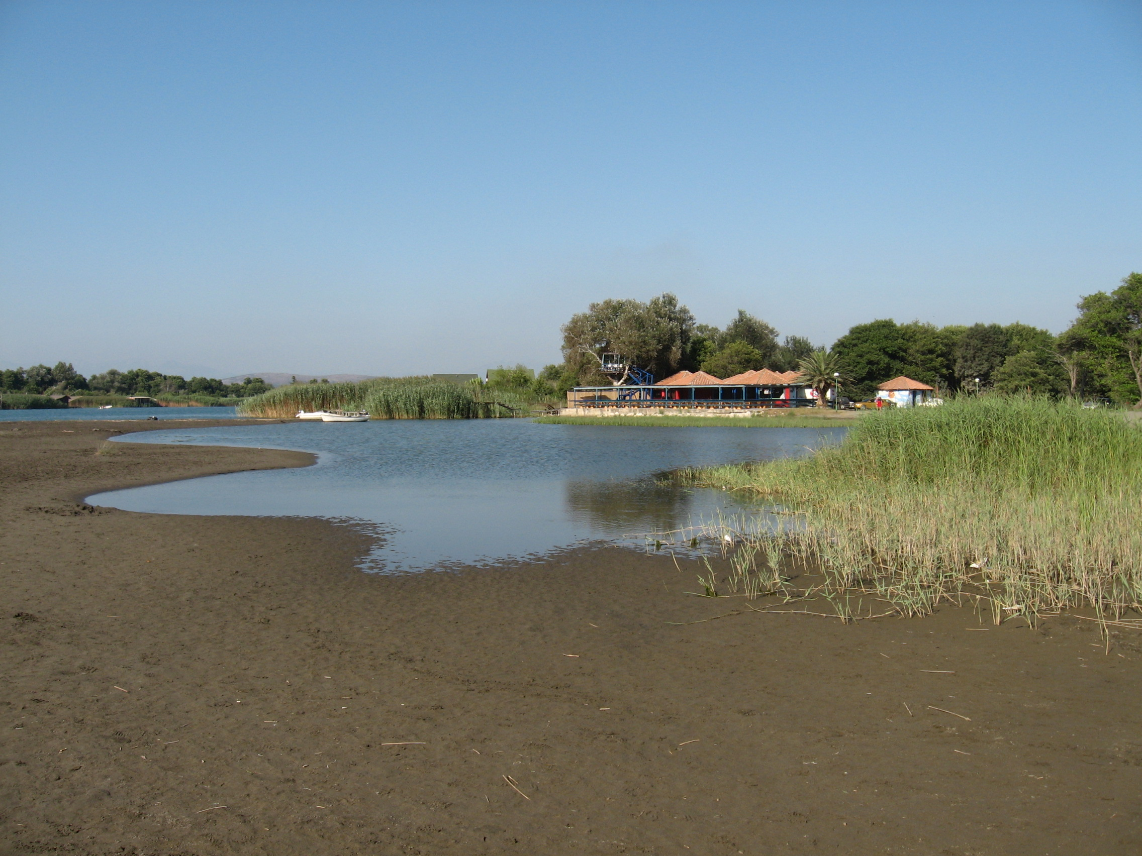 Detalj sa ušća Ade Bojane.